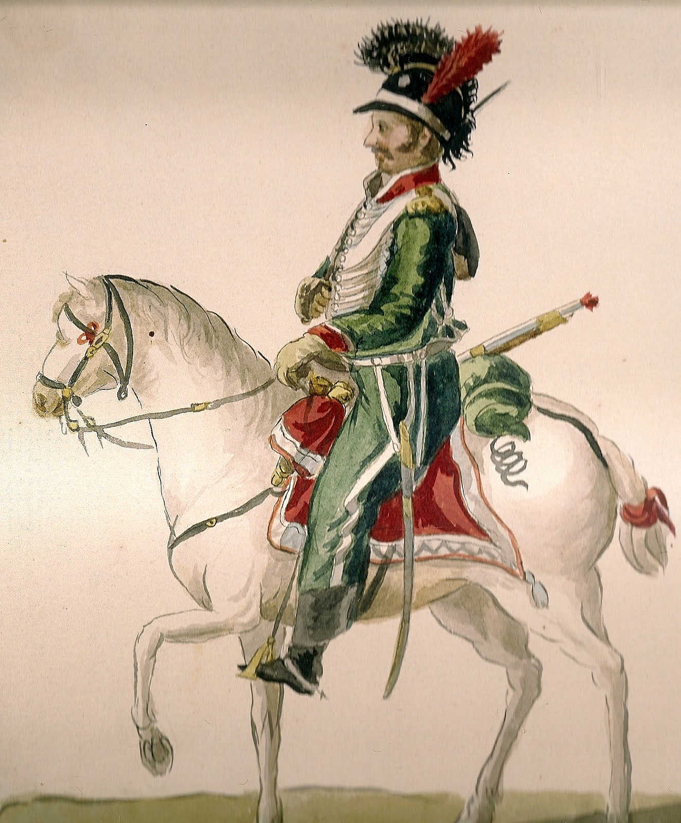 Independencia de México. Dragón de la escolta del General Guerrero.